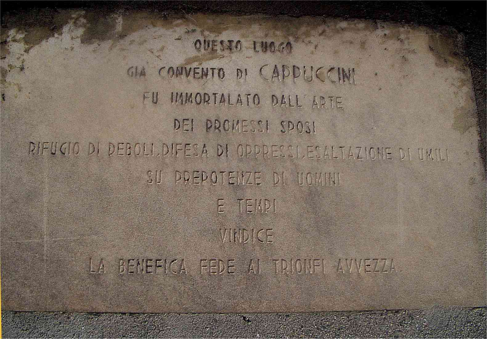 Lapide murata nel muro di cinta dell'ex convento dei Cappuccini in via Marsala n.44 a Monza